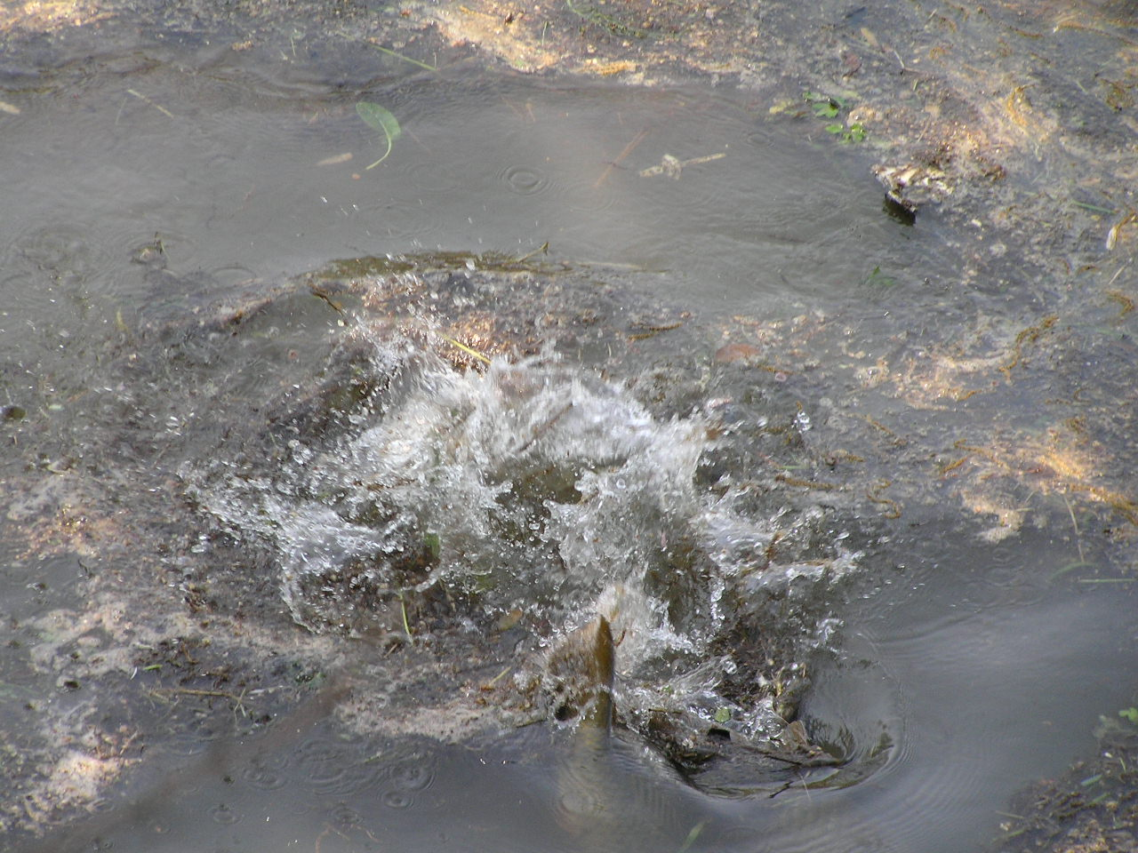 ヘラブナとコイの乗っこみ・ハタキ（篠山城堀）